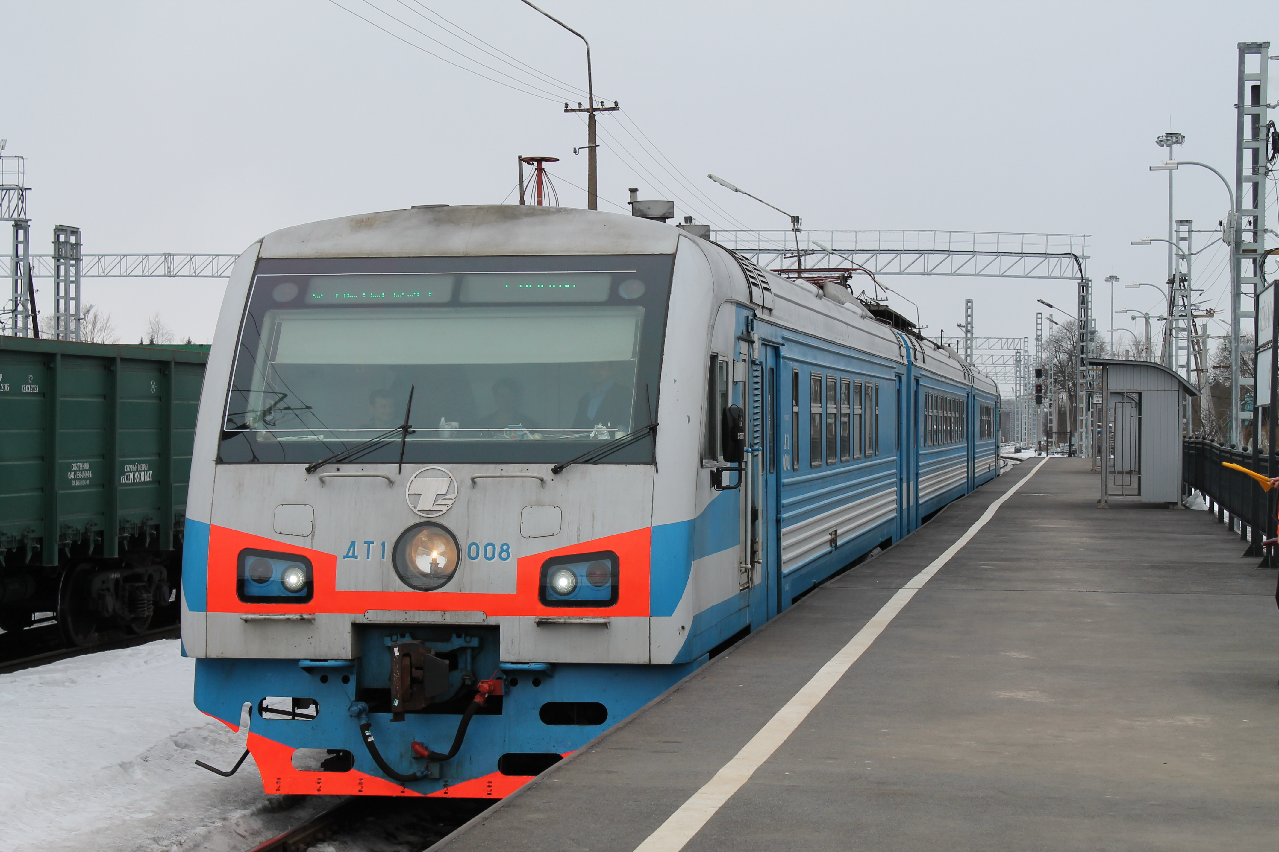 ДТ1-008, станция Веймарн см. фото 495483 в альбоме автора